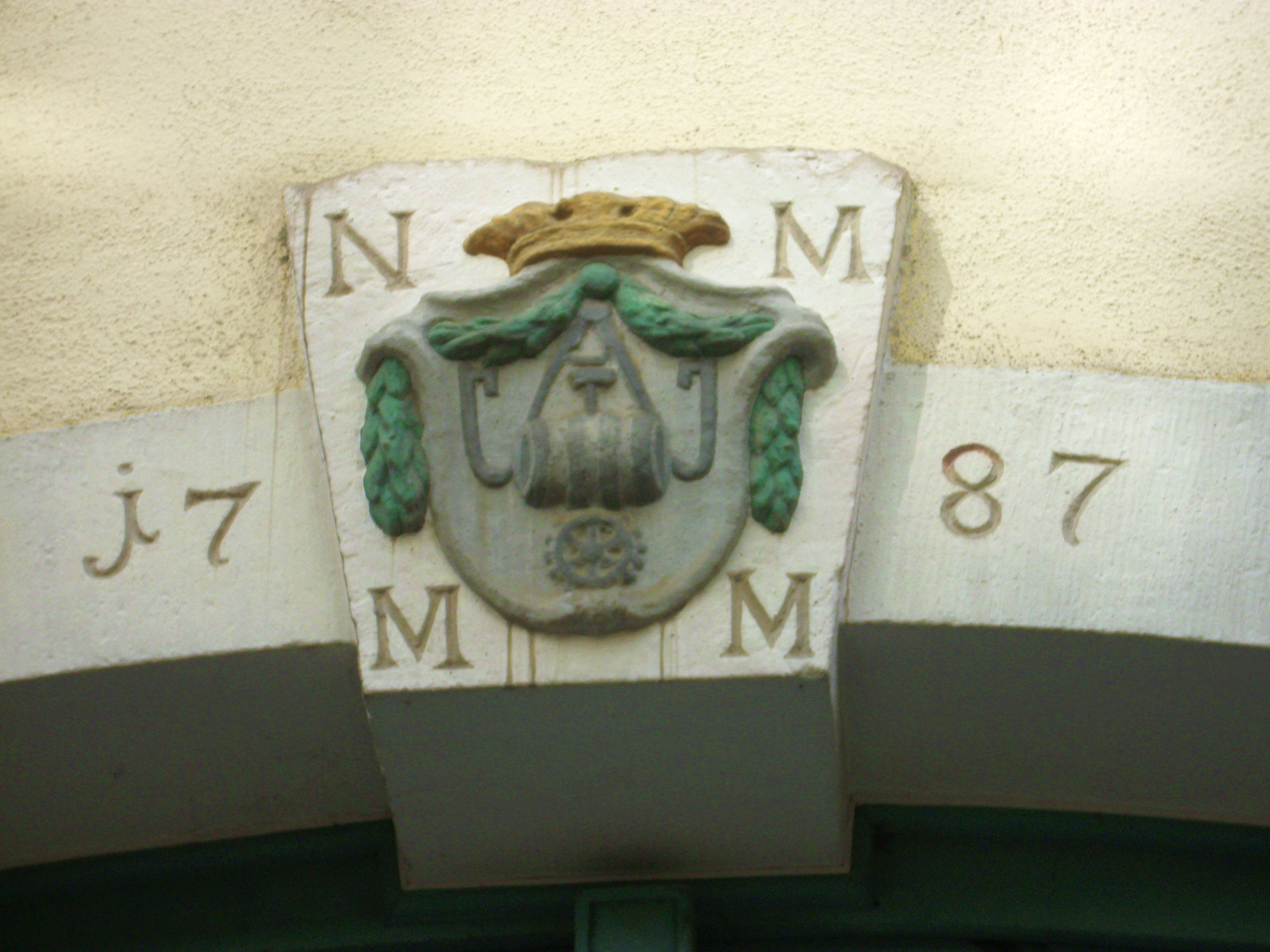 Haus Zum Geisenheimer, dreigeschossiger Putzbau, teilweise Fachwerk, 18. Jahrhundert, über älterem Keller, Aufstockung und Anbau im 19. Jahrhundert